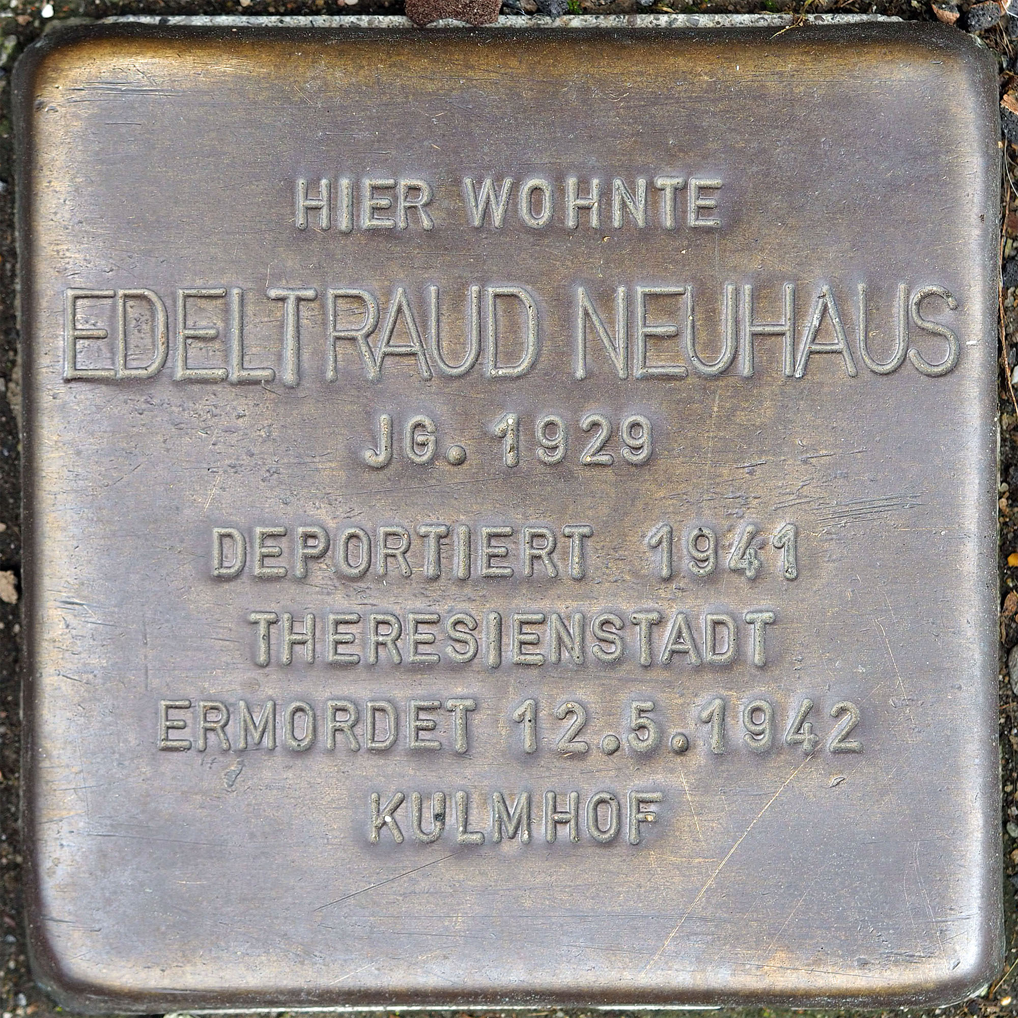 Stolpersteine Korschenbroich: Neuhaus, Edeltraut